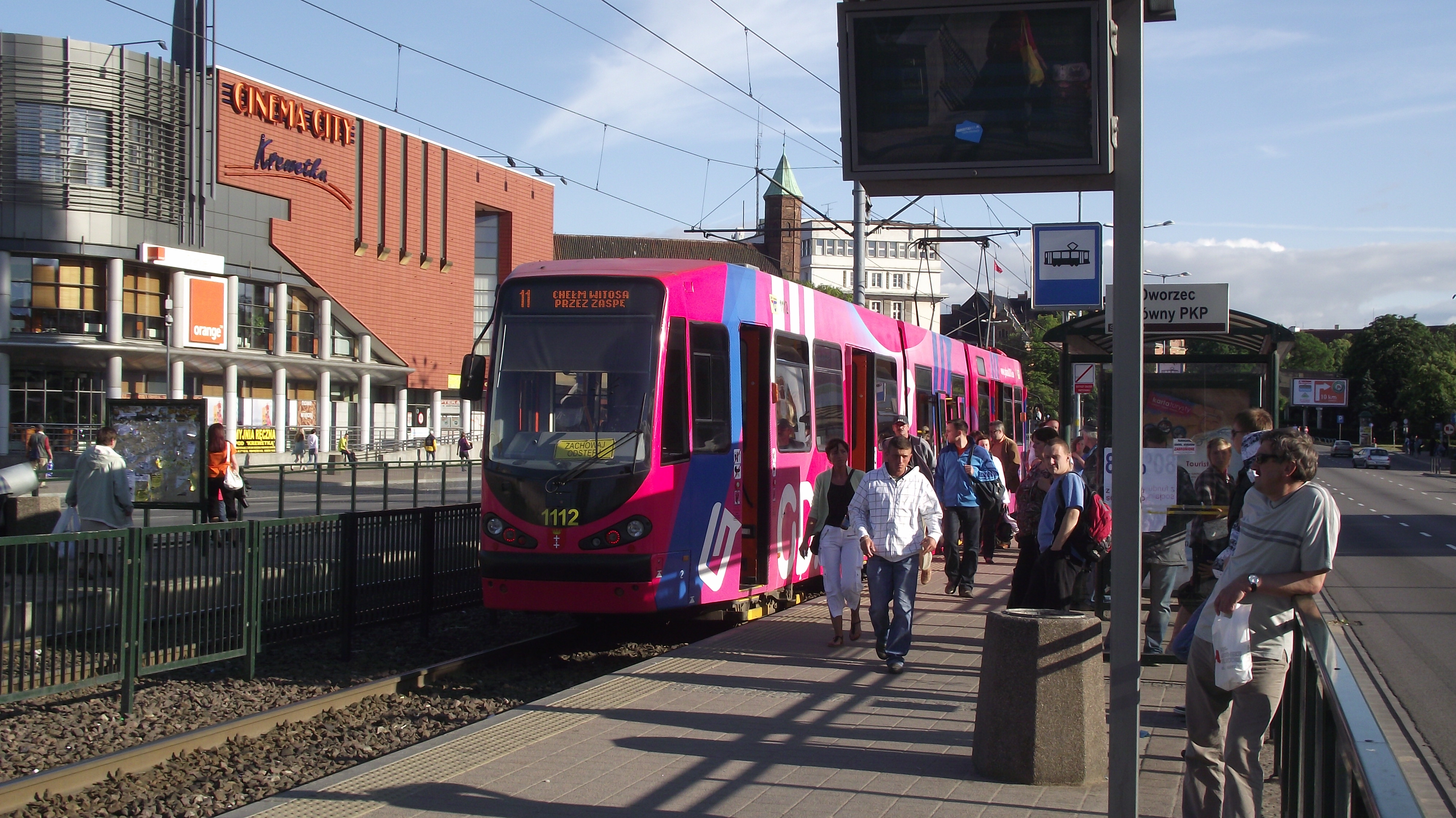 Trams in Gdansk